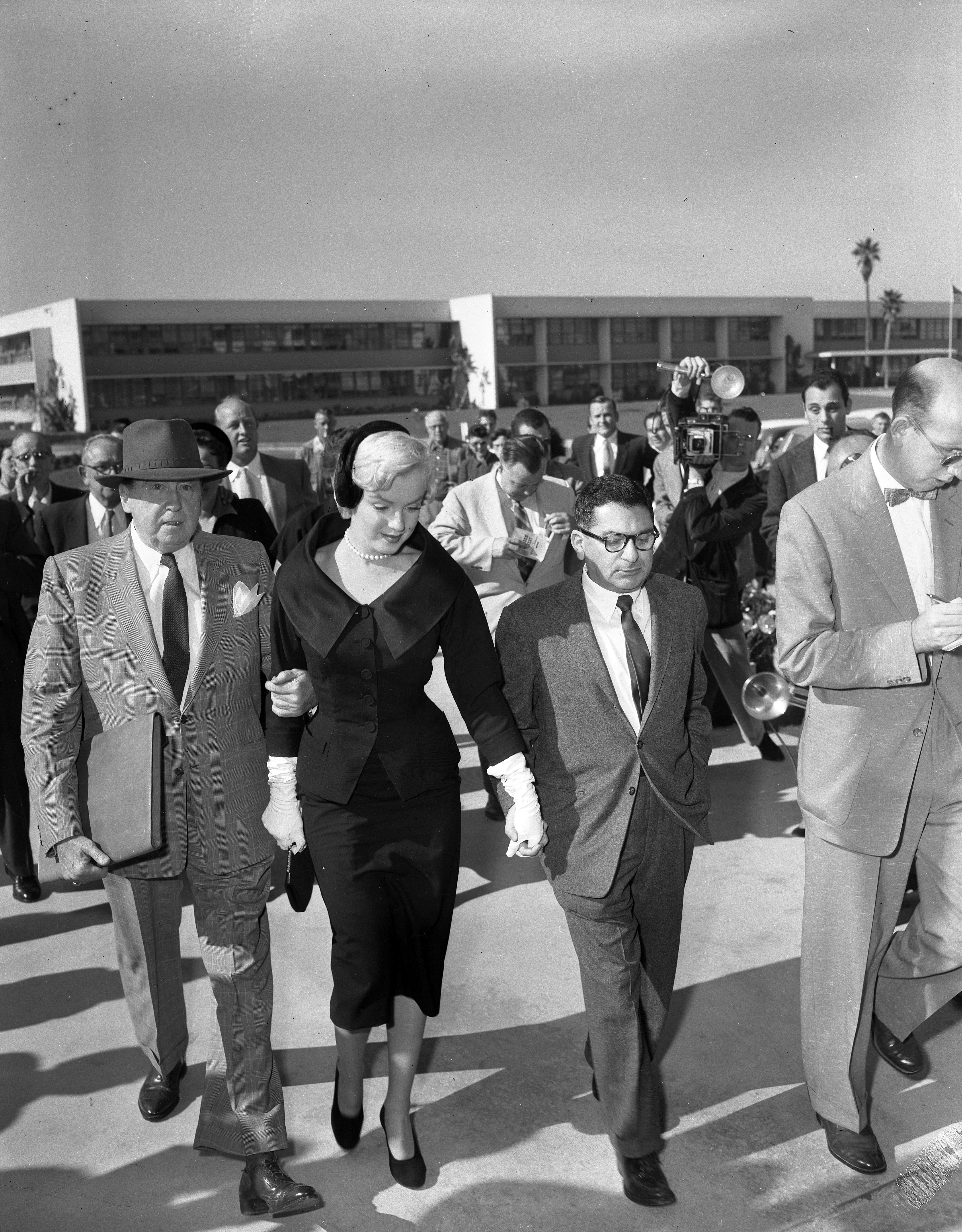 Actress Marilyn Monroe walking from Santa Monica courthouse with her attorney, Jerry Giesler, and gossip columnist and friend, Sidney Skolsky, after divorce from Joe DiMaggio (Marilyn Monroe zavěšená do svého právního zástupce Jerry Gieslera v Santa Monice po rozvodovém řízení s Joe DiMaggiem, po její levici její přítel novinář Sidney Skolsky)